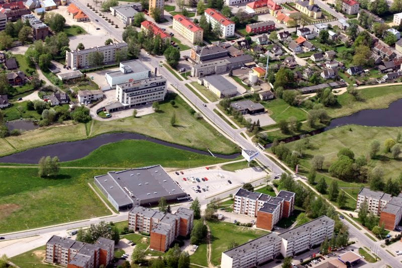 Vabaduse tänava sild üle Koreli oja, Võru